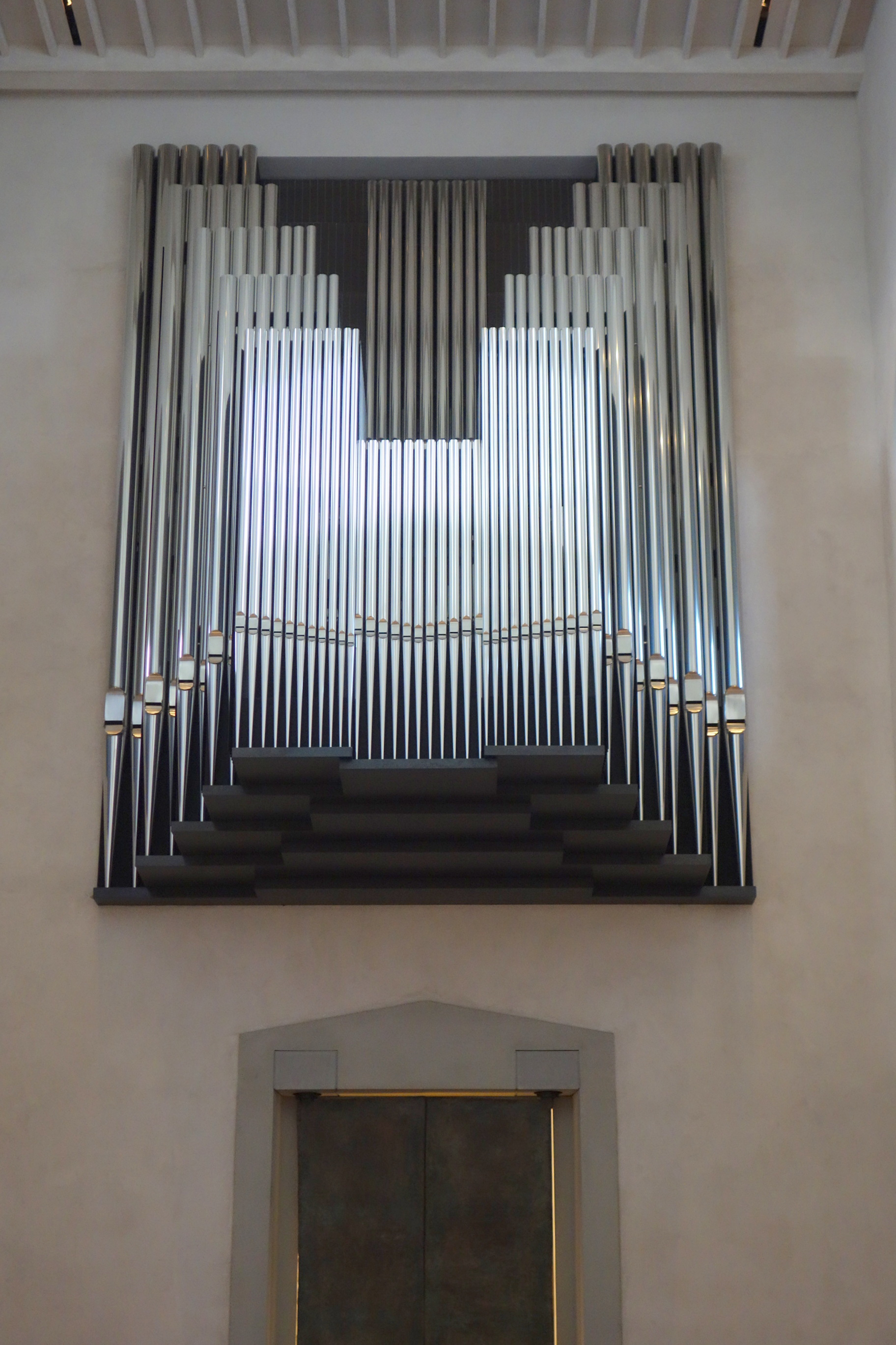 Hildesheimer Dom, Niedersachsen, Deutschland